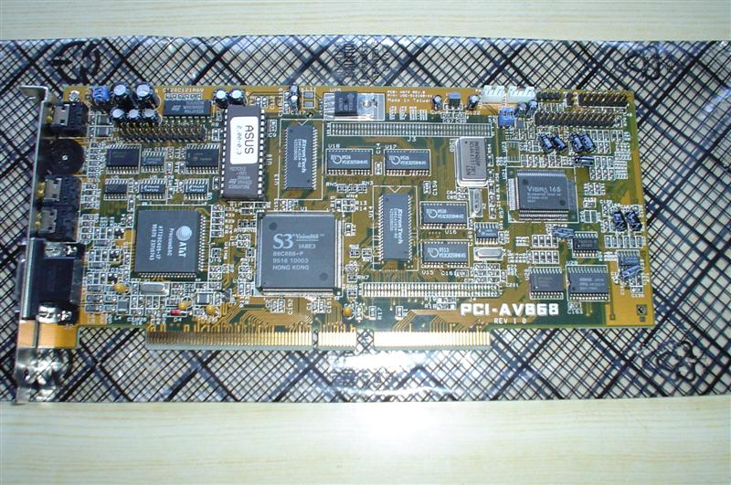 Asus PCI-AV868 MediaBus karte